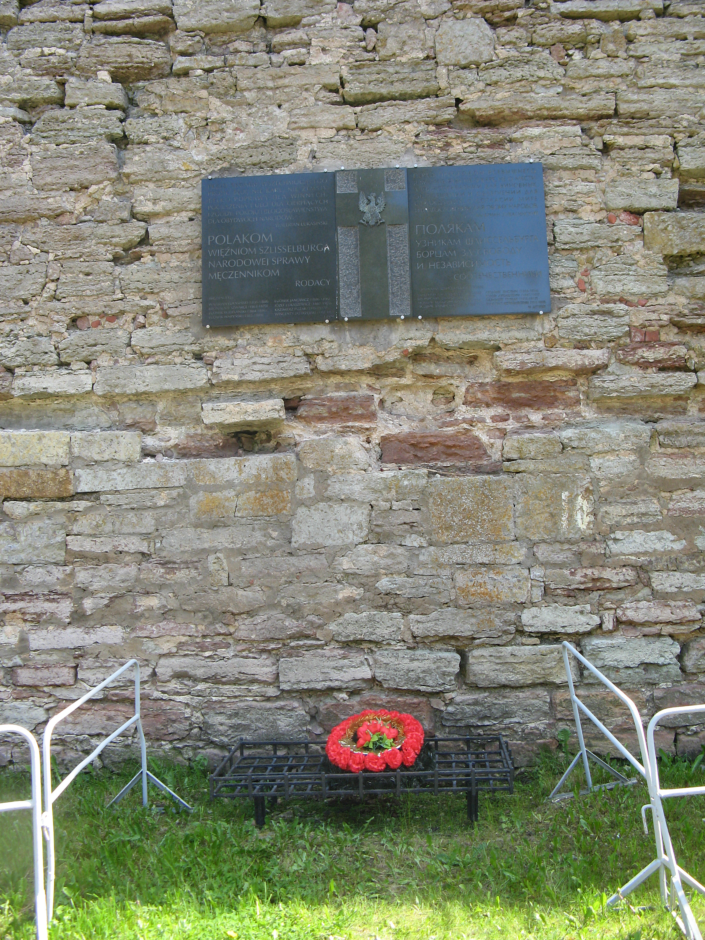 Ансамбль крепости Орешек (Шлиссельбургская крепость-тюрьма): Ореховый остров, Шлиссельбург, Кировский район, Ленинградская область